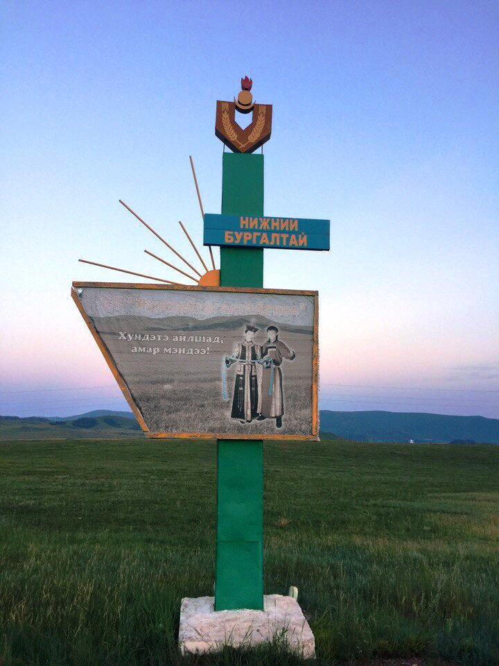 At the entrance to the village of Nizhny Burgultay